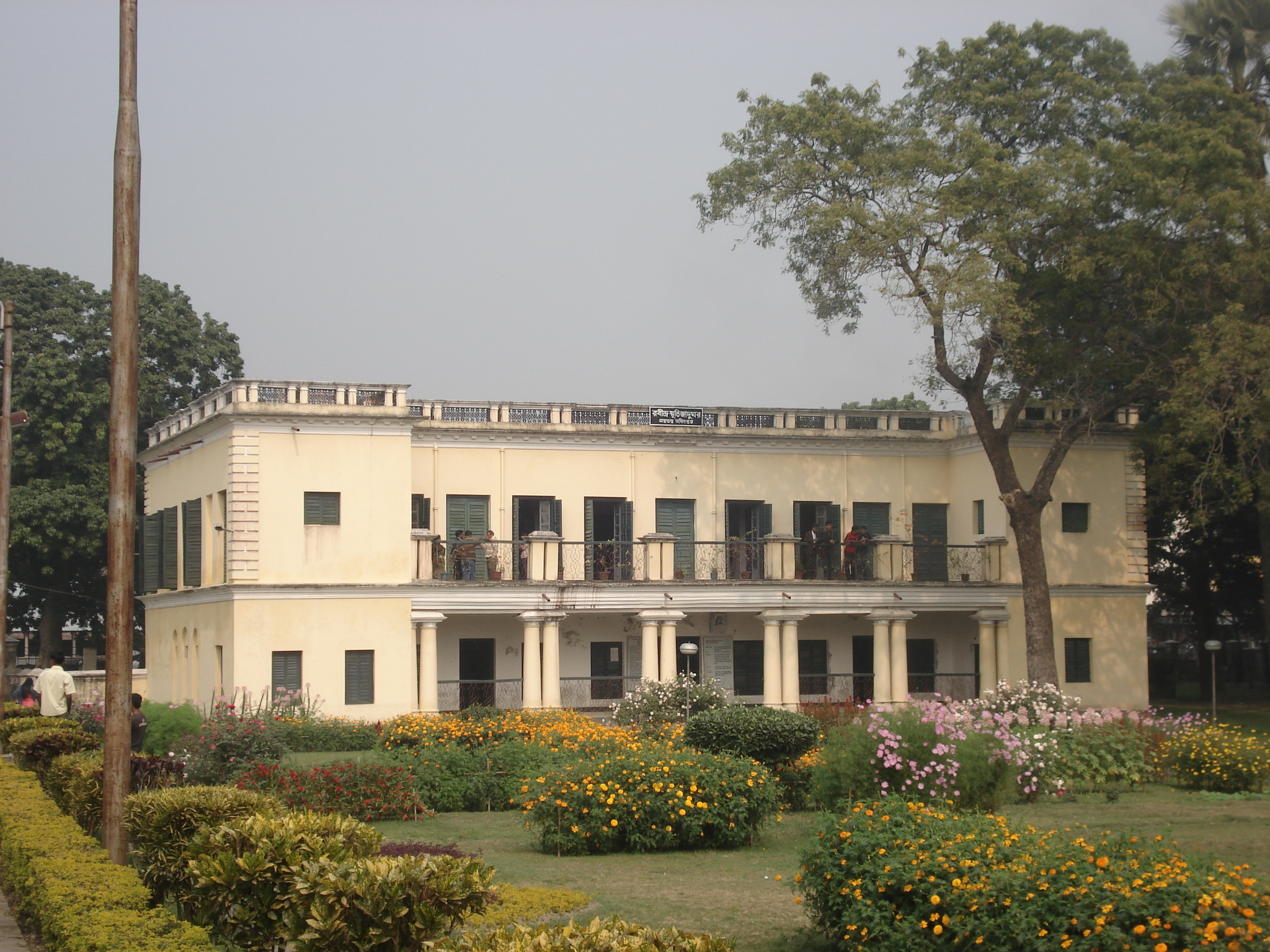 Kachari Bari